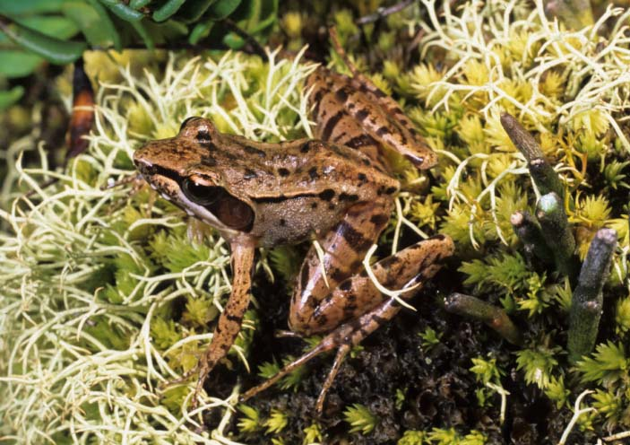 Mantidactylus brevipalmatus